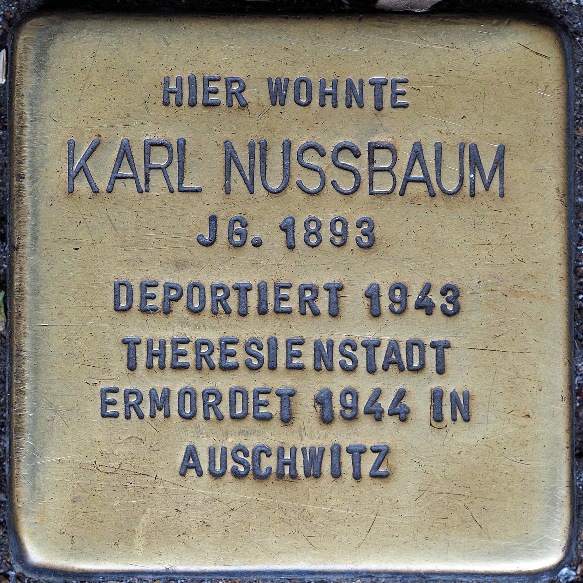 Stolpersteine MG: Nussbaum, Karl